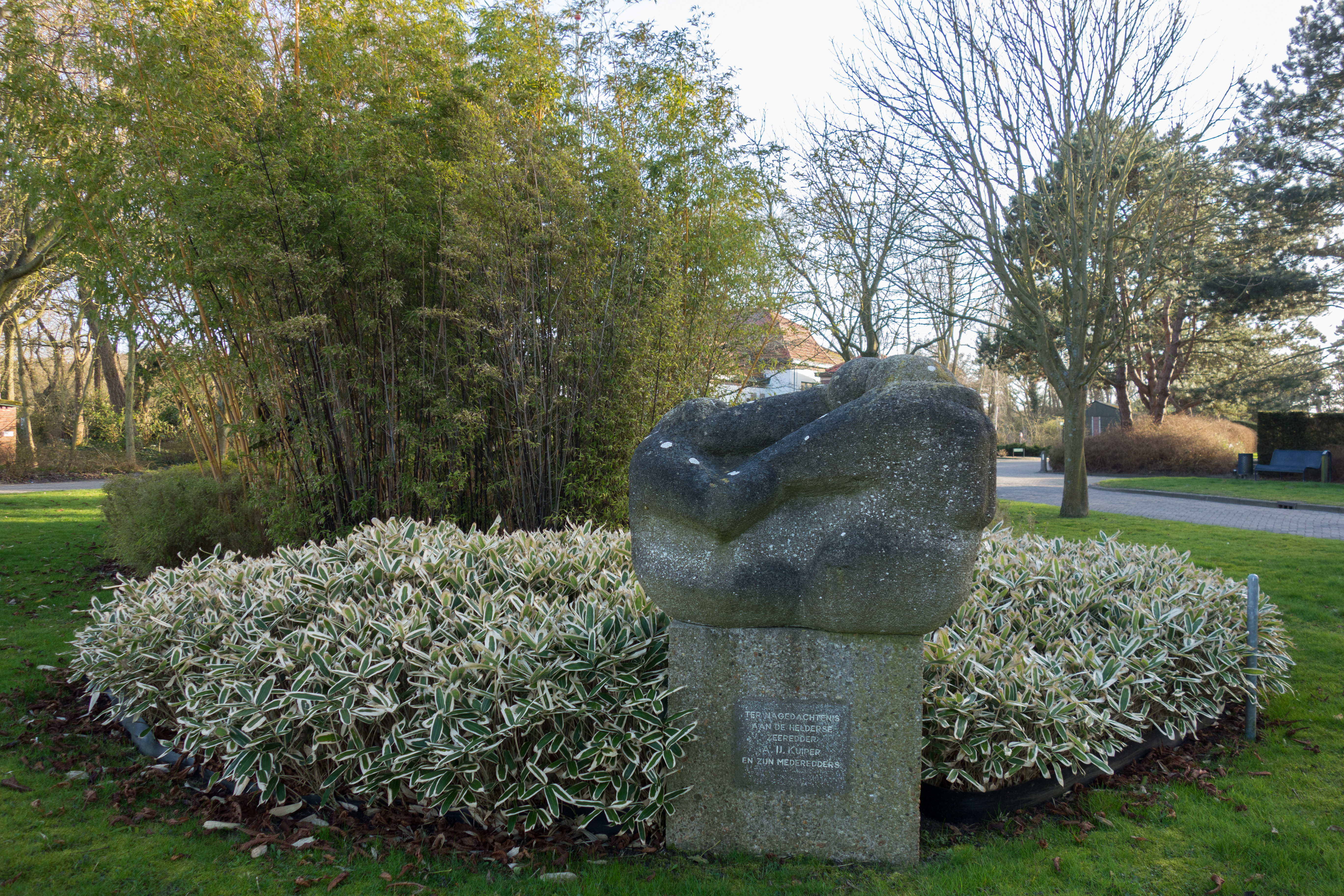 Het Zeereddermonument (ter nagedachtenis aan Janus Kuiper) voor de ingangspartij van de Algemene Begraafplaats in Huisduinen.